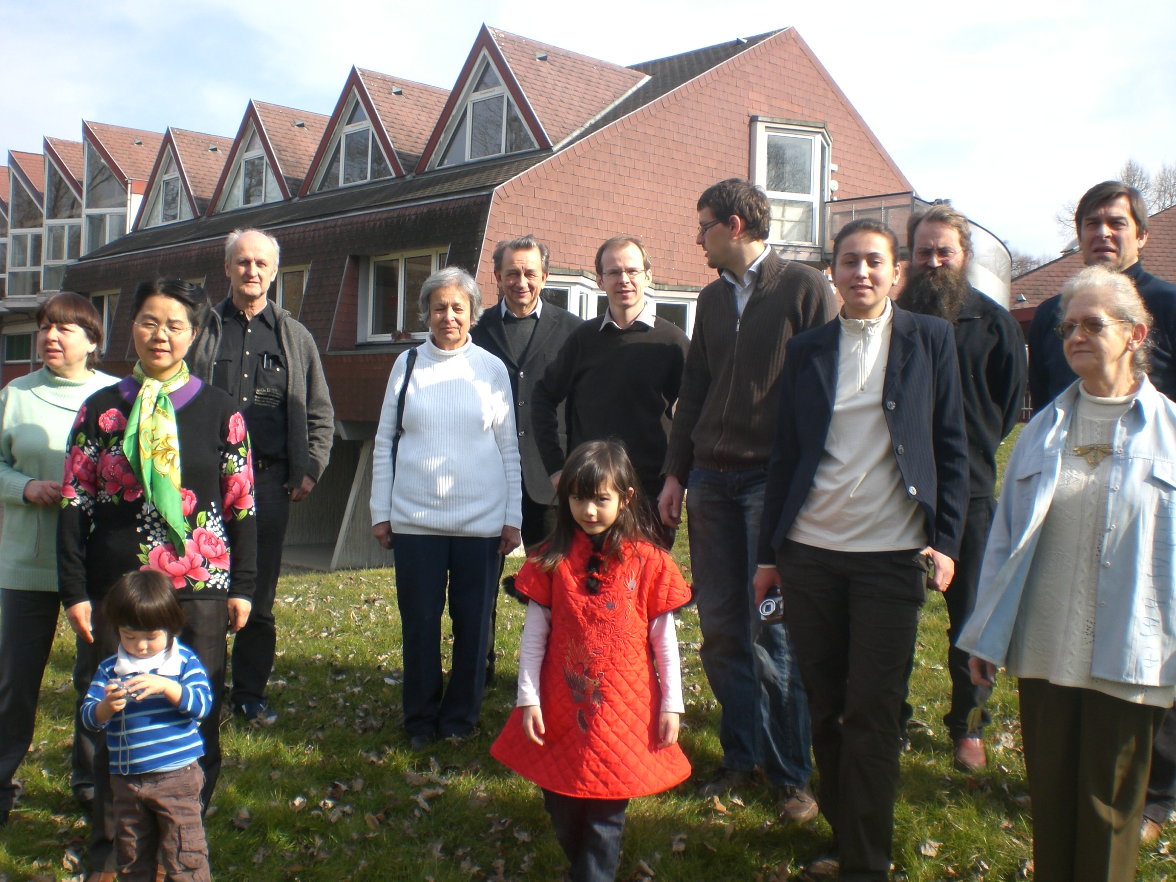 Partoprenantoj de la 1-a Internacia Konferenco de EDE en Strasburgo, 27.02.-01.03.2009